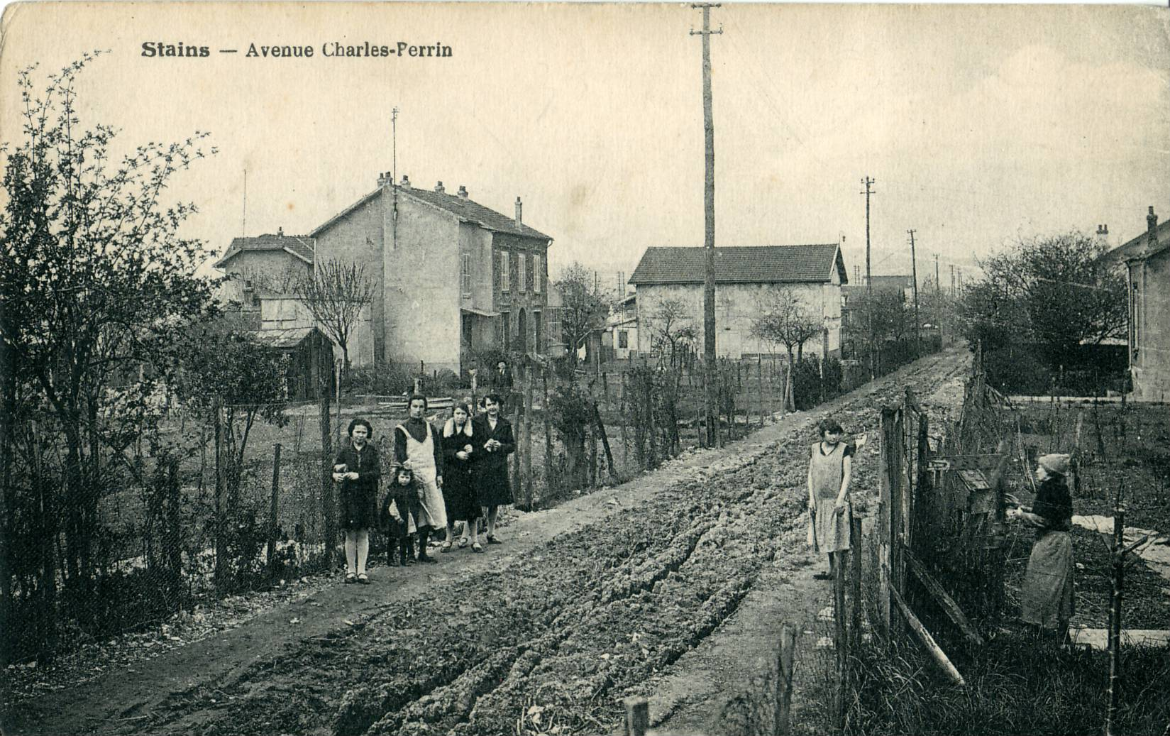 Carte postale ancienne éditée par Bouchetal STAINS - Avenue Charles Perrin L'expression "mal-loti" avait un sens très précis au début du XXe siècle ...